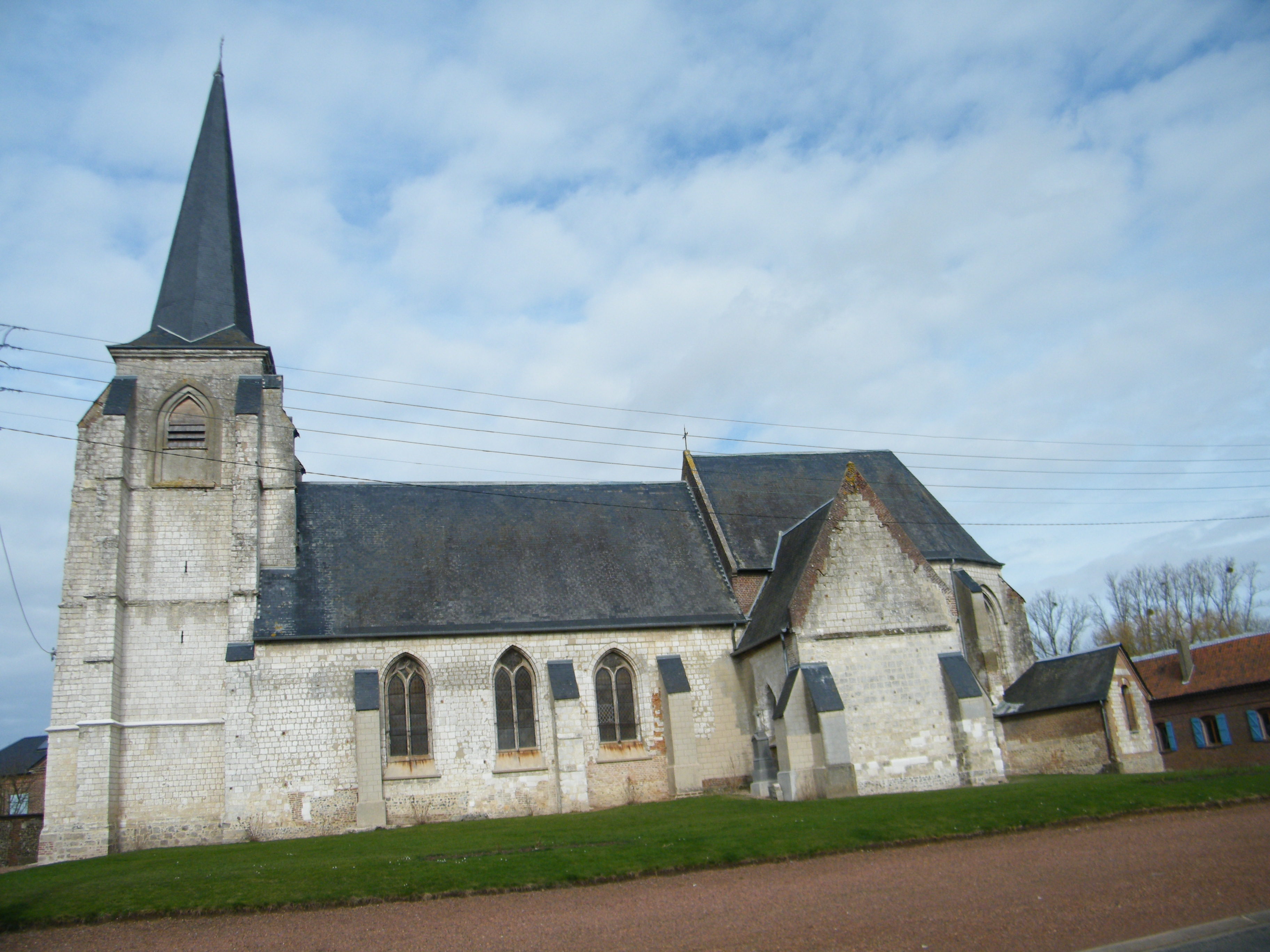 L'église Saint-Fursy de Gueschart (Somme), France.